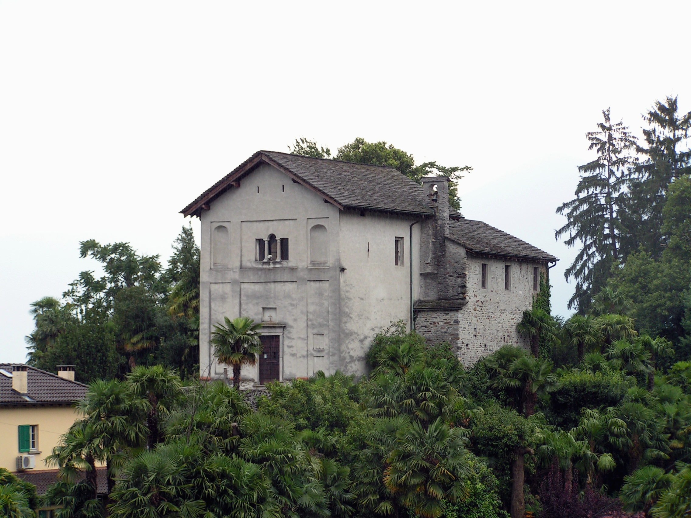 Via San Michele 32, Ascona. Église de San Michele.